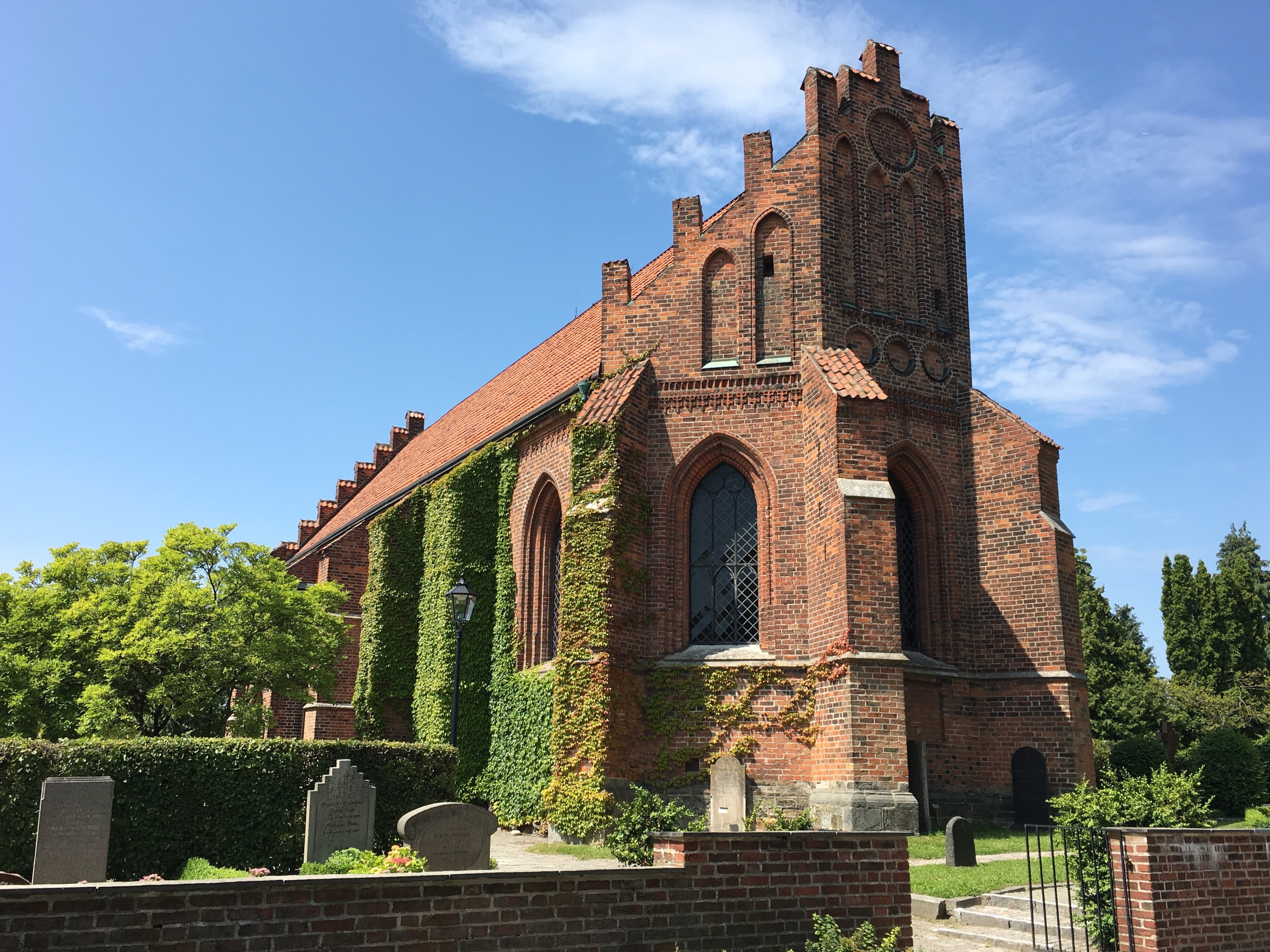 Sankt Petri Klosterkirkes østfacade i Lund, Skåne, Sverige